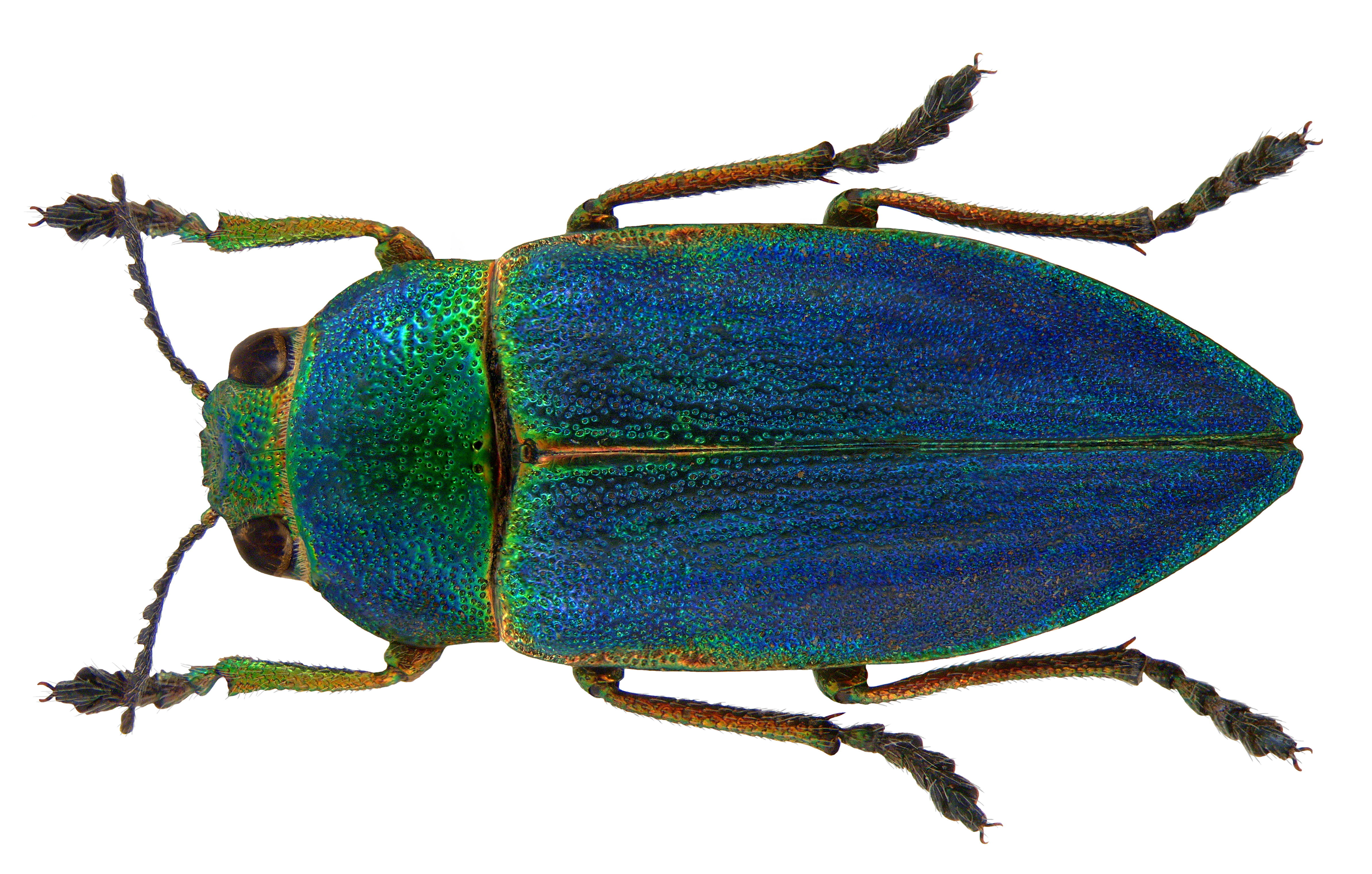 Familie: Buprestidae Grösse: 14 mm Fundort: Türkei, Prov. Mersin, Aydincik leg. A.Skale, 2002; det. M.Niehuis, 2002 Foto: U.Schmidt, 2009